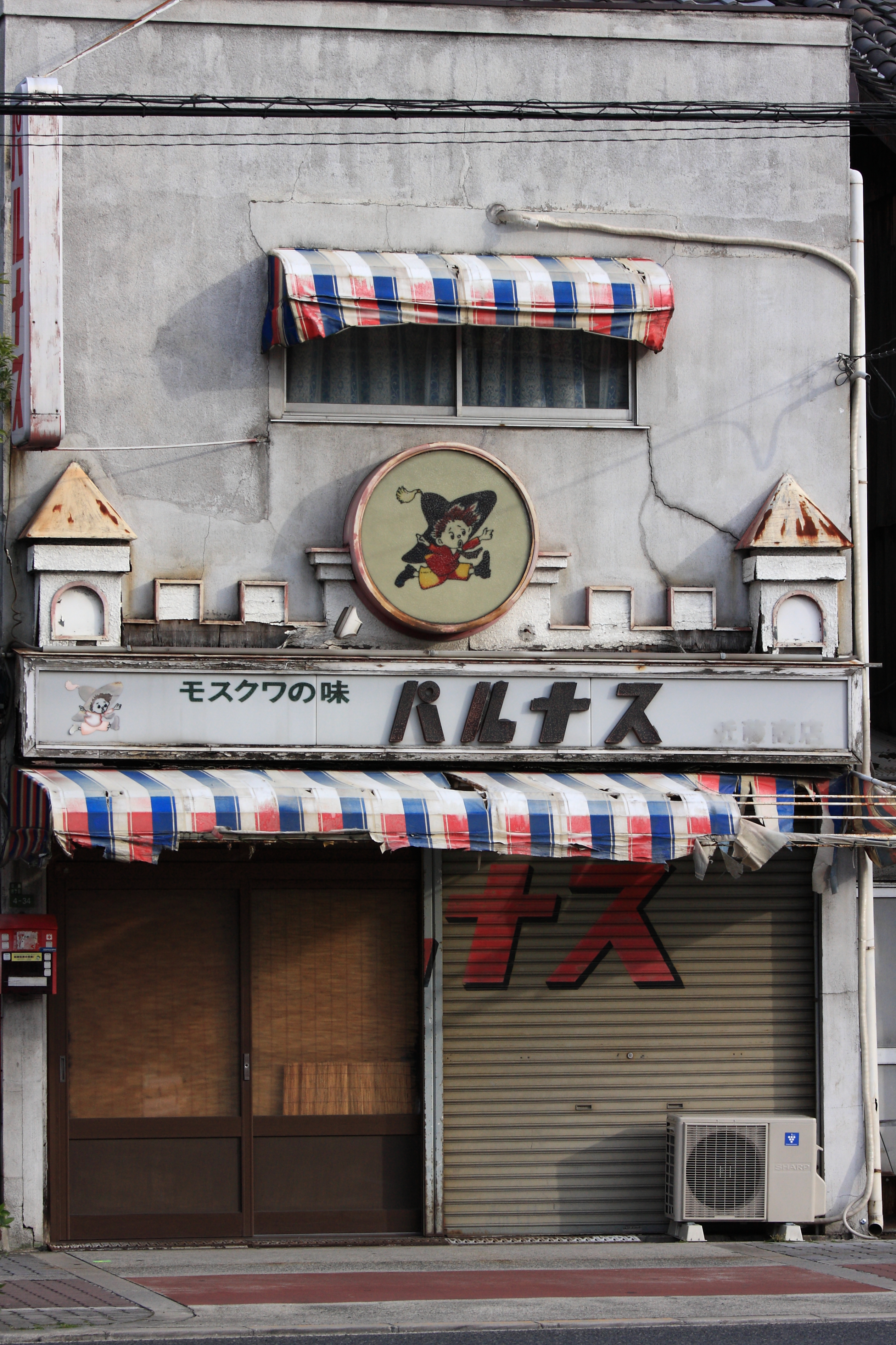 Parnasse（Cake shop）-01